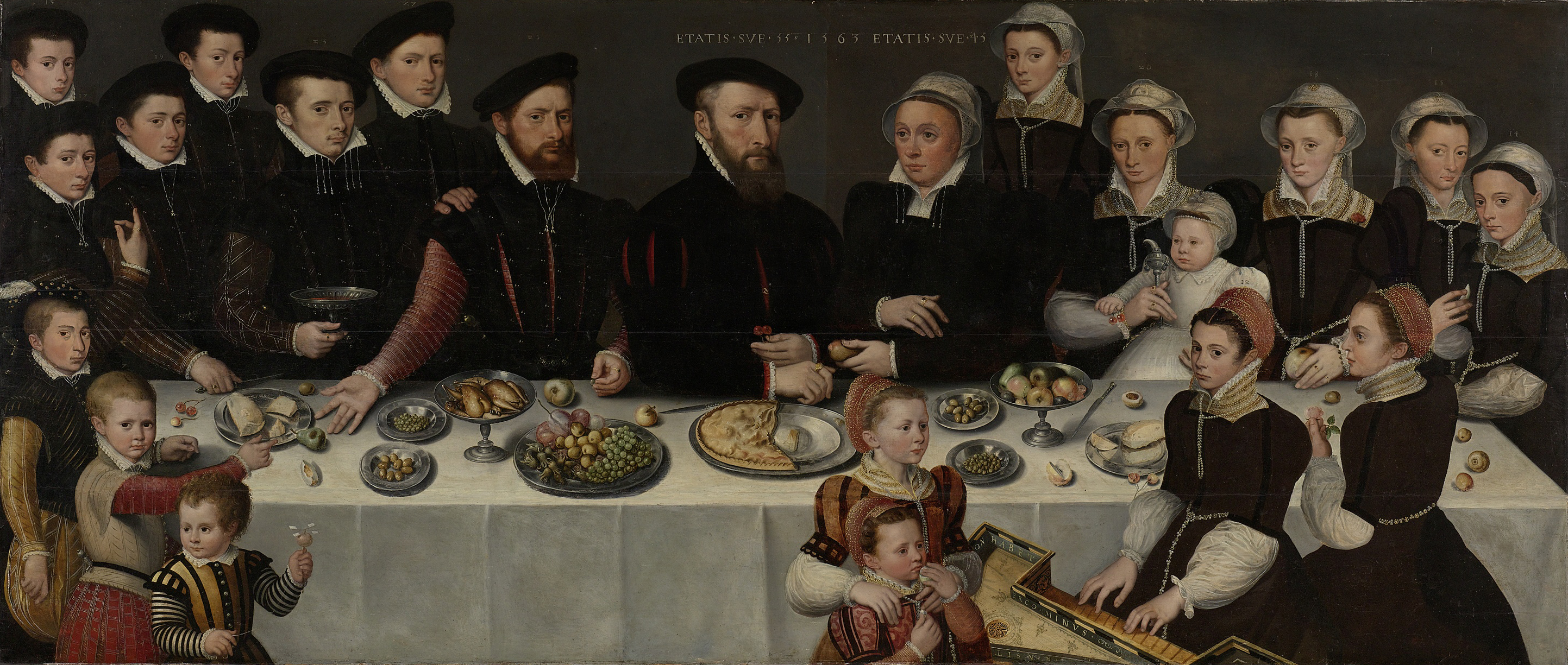 Familieportret van Pierre de Moucheron (1508-67), koopman te Middelburg en Antwerpen, zijn echtgenote Isabeau de Gerbier, hun achttien kinderen, hun schoonzoon Allard de la Dale en hun eerste kleinkind. Het gezin staat ten halven lijve rond een rijk gedekte tafel waarop borden en schalen met brood, olijven, fruit, een pastei en gebraden gevogelte. Linksvoor een jongetje met een speelgoed molentje, rechts speelt een meisje op een virginaal.